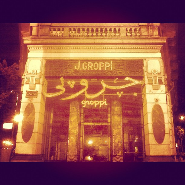 Groppi Cafe